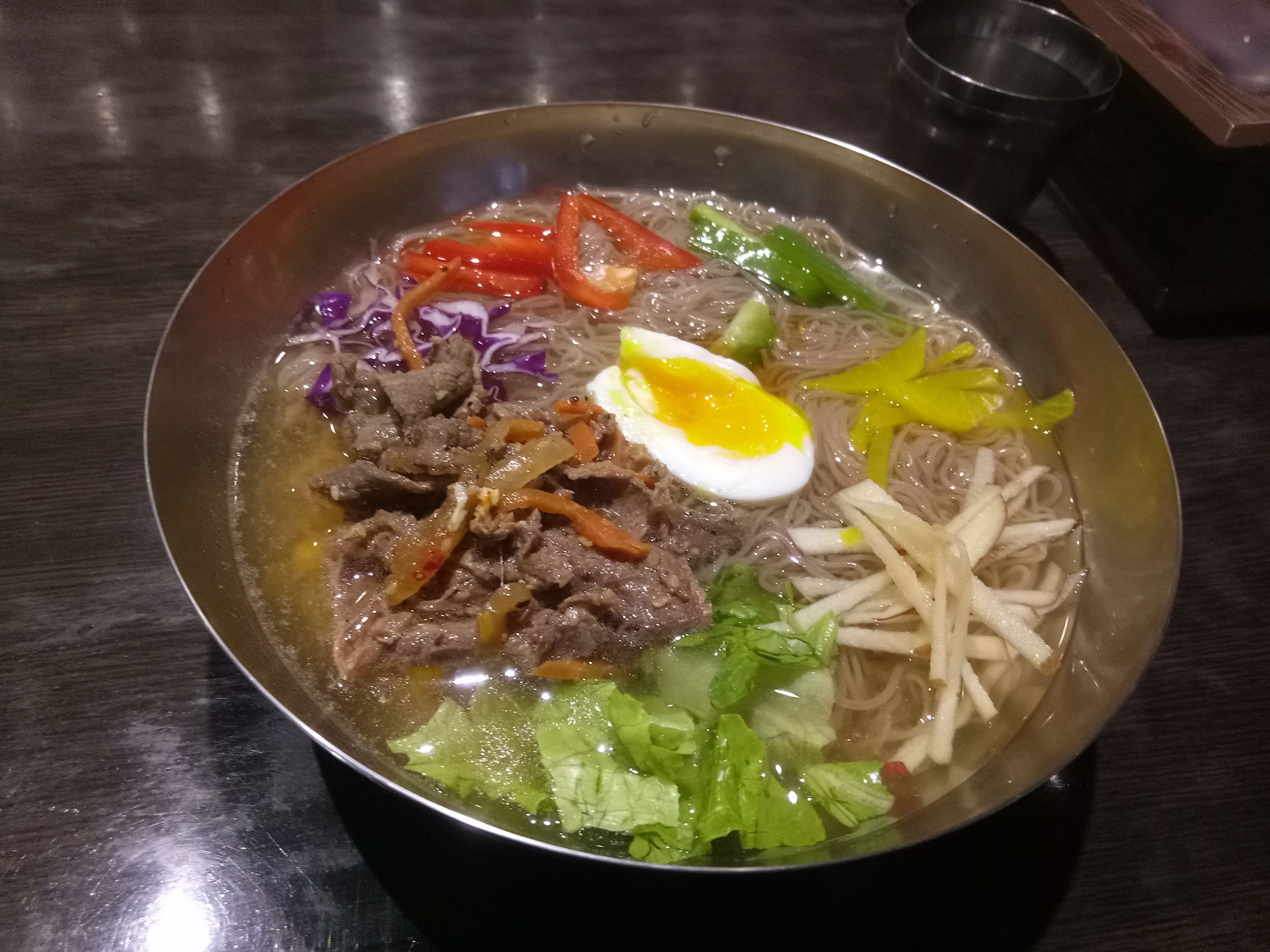 台灣台北市一所韓式餐館所販售之平壤冷麵。